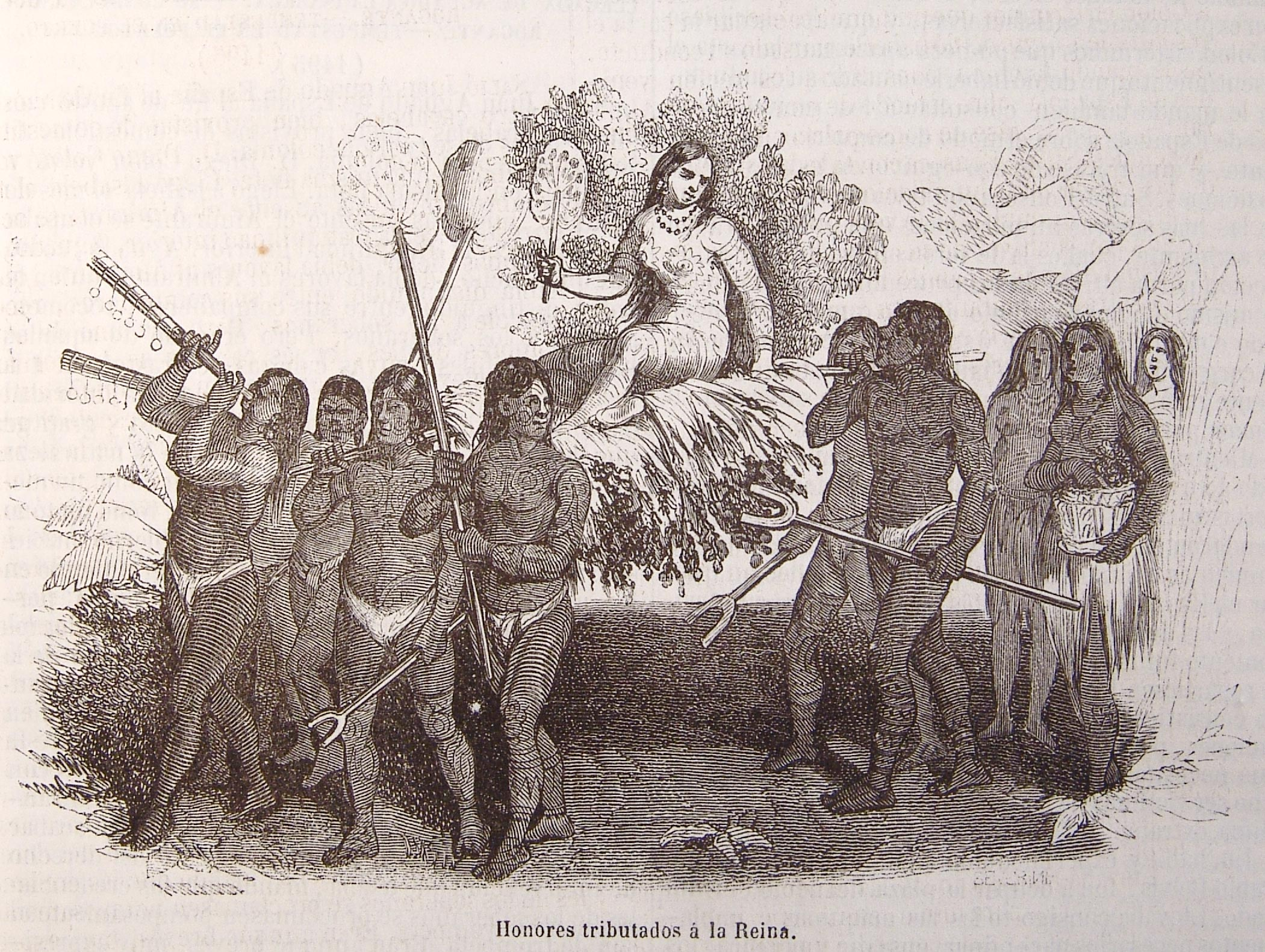 Honores tributados a la Reina